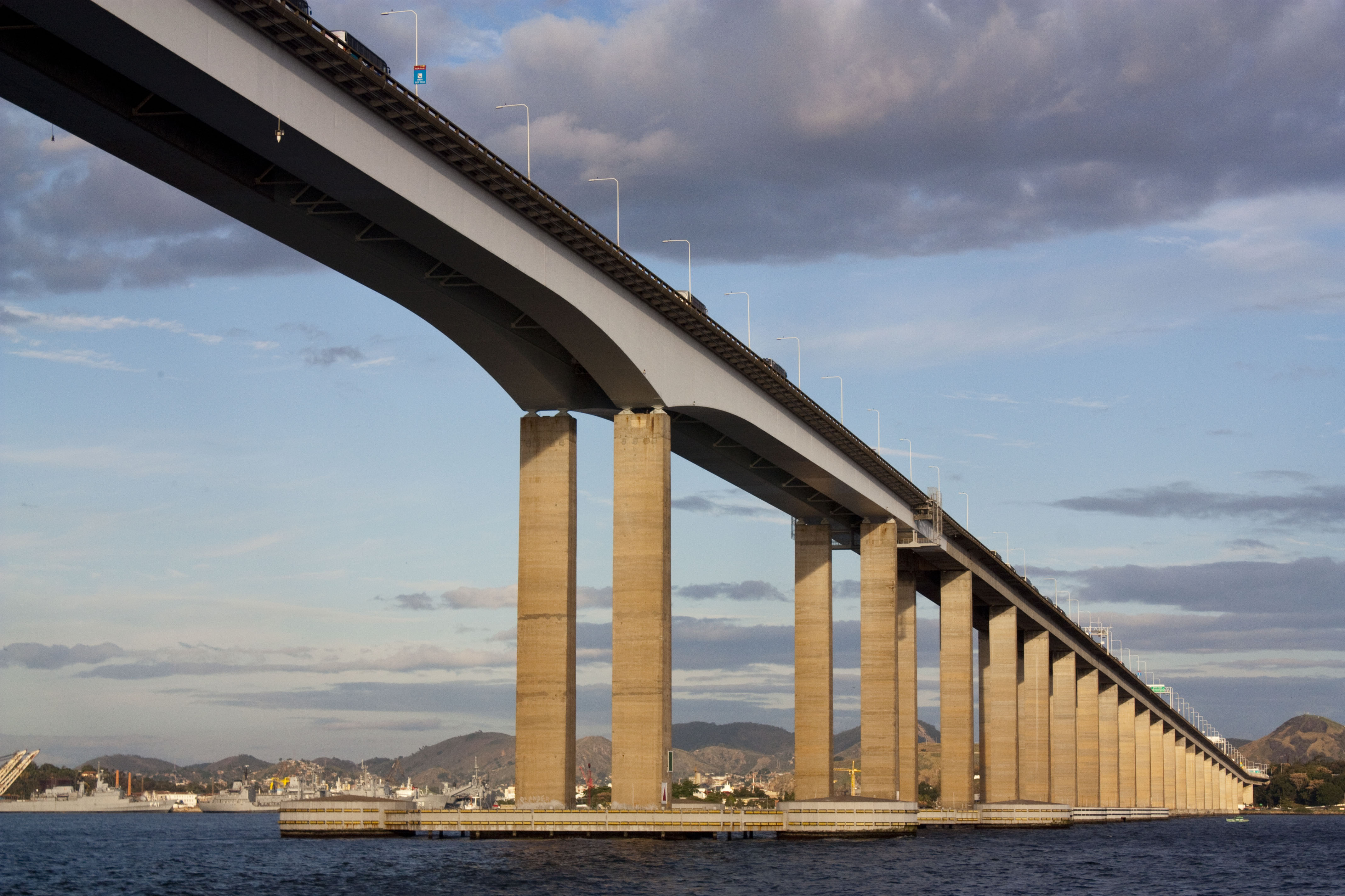 Rio-Niterói Bridge